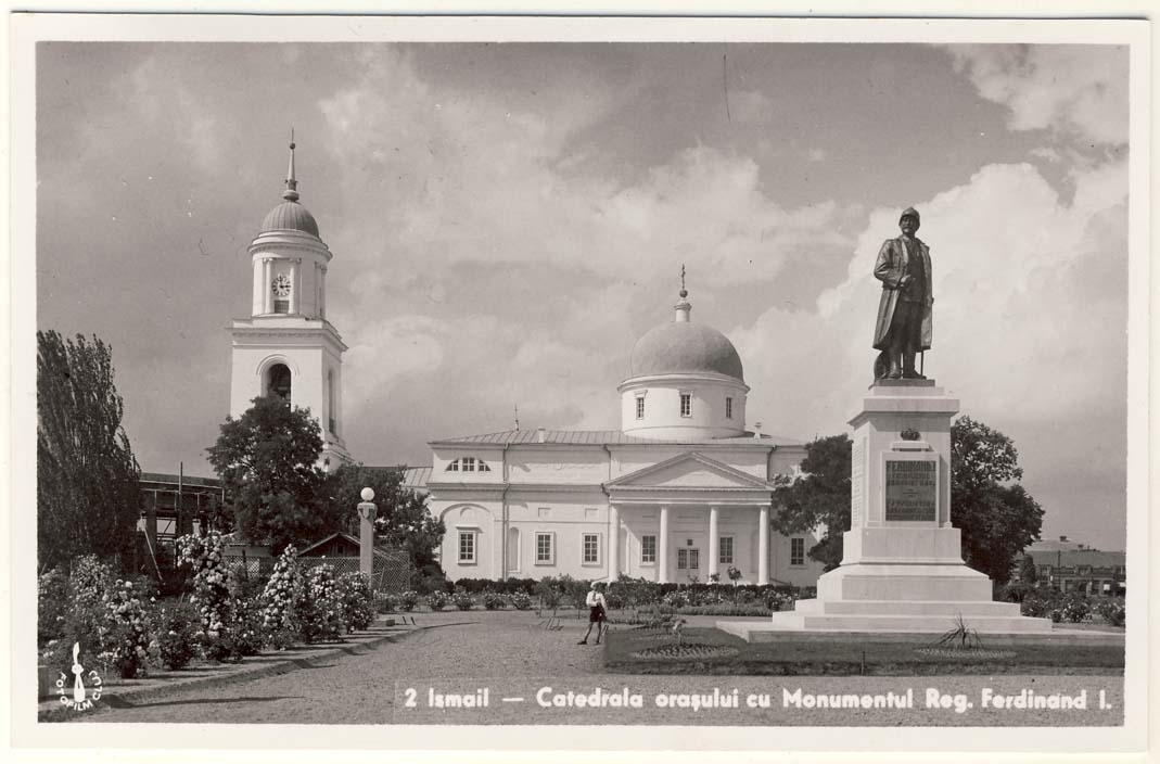 Ismail - Catedrala orasului cu Monumentul Regelui Ferdinand I